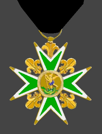 Kruis van de Orde_van_de_Heilige_Michaël. Eigen tekening